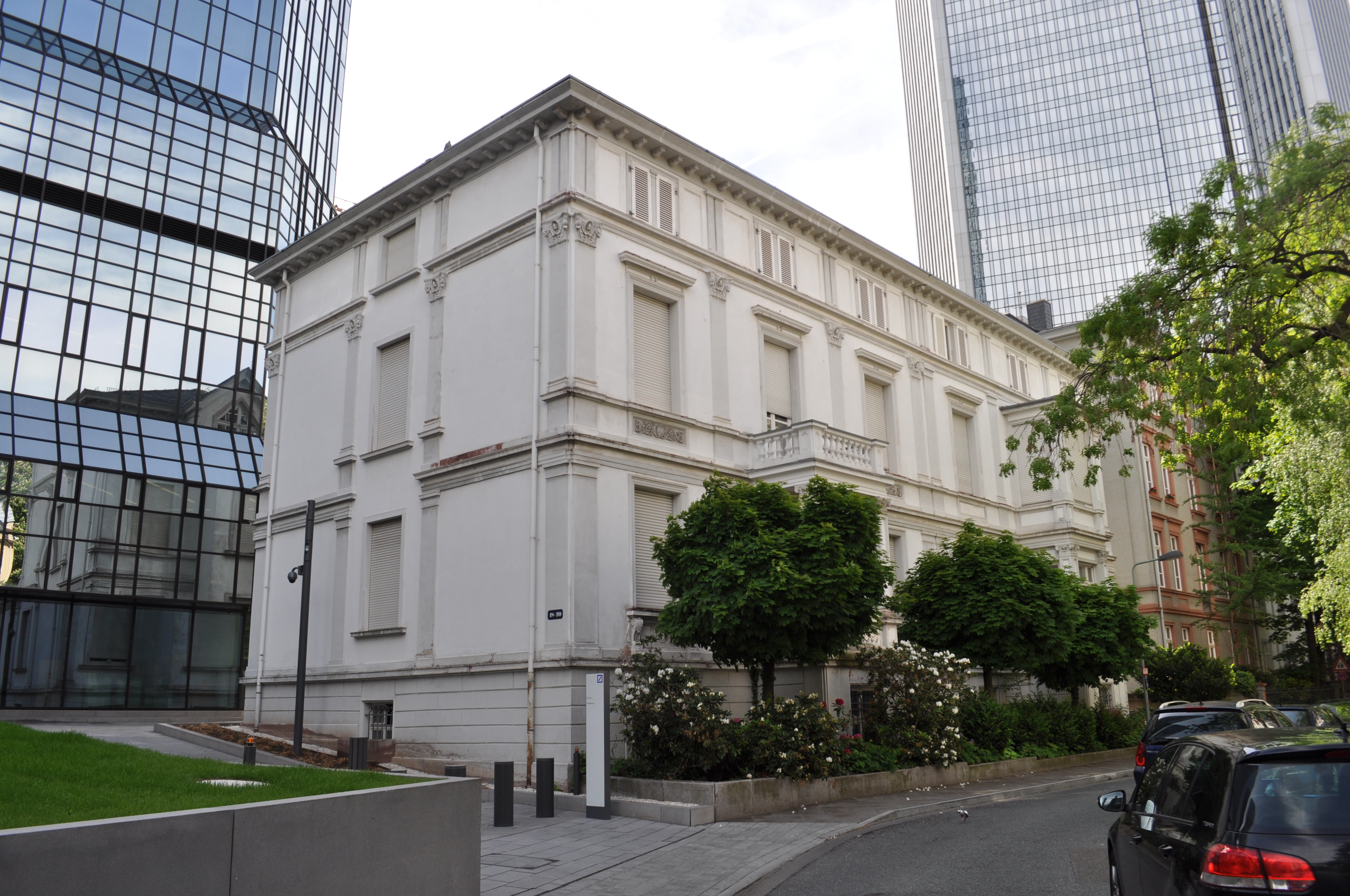 Frankfurt, Klüberstraße 18-20